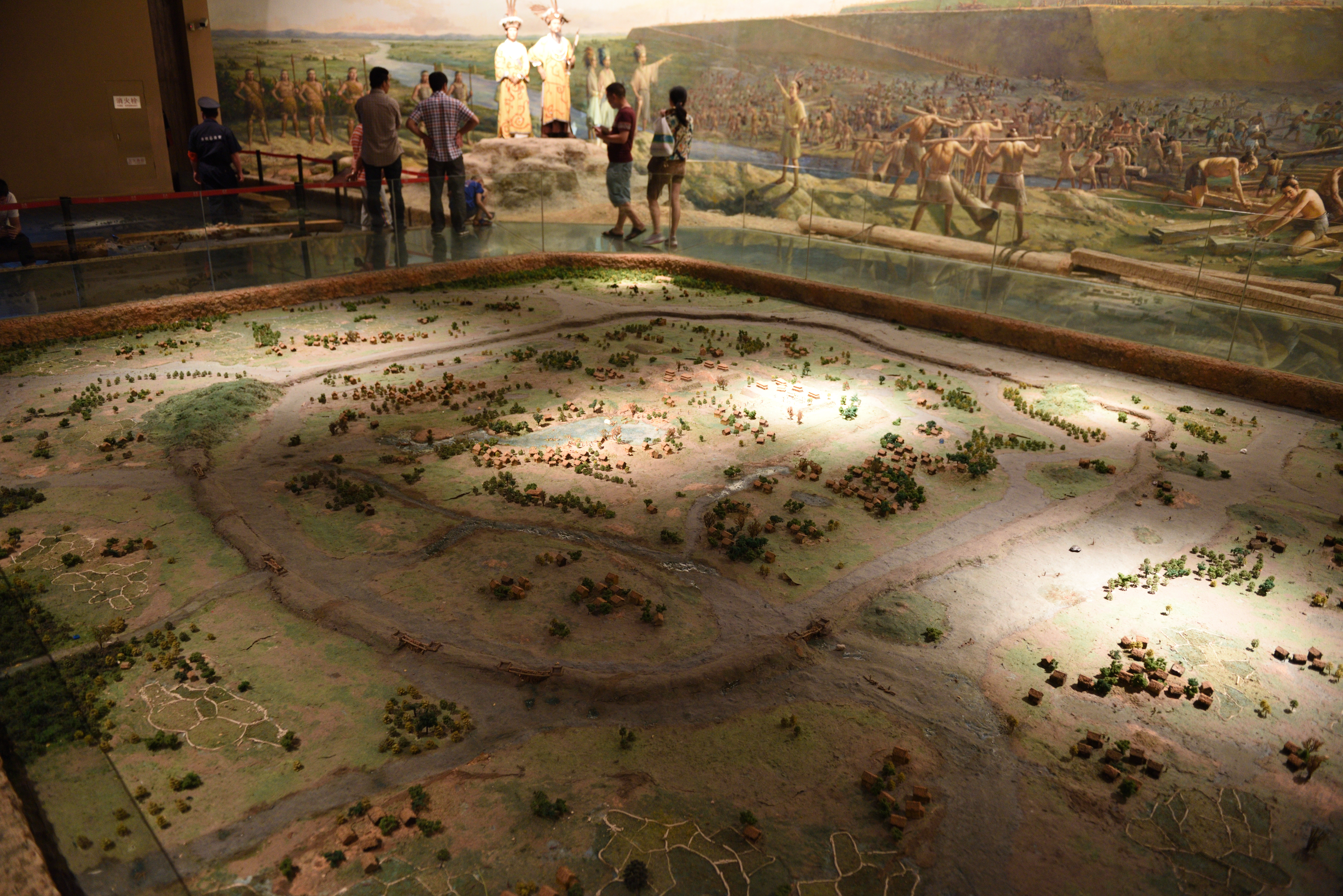 良渚古城模型